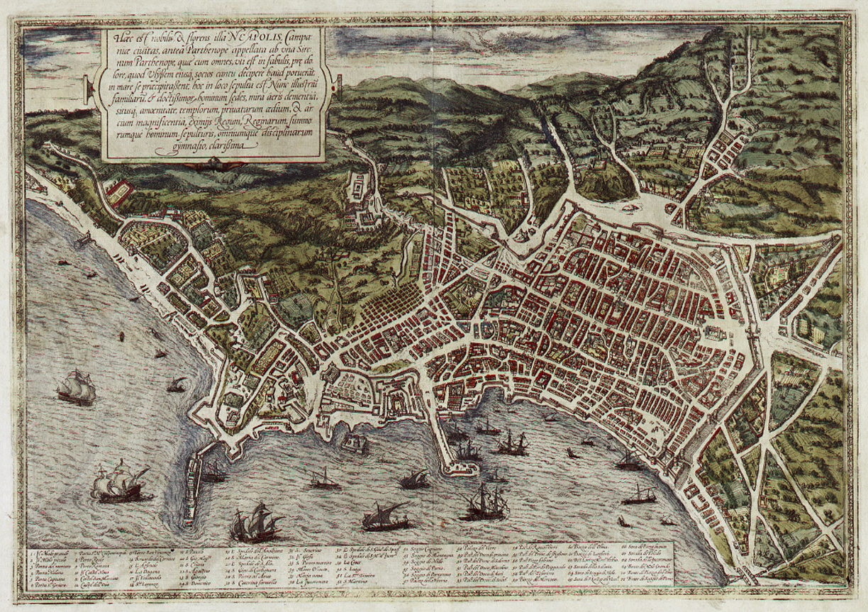 Napoli